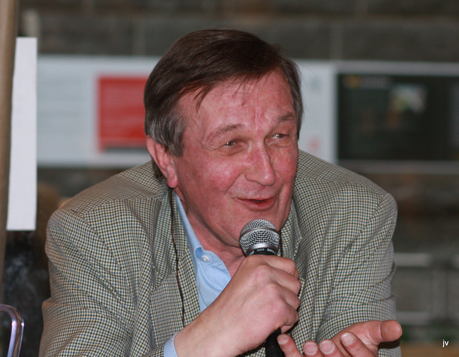 Harald Hove , at Kultkafeen in Stavanger